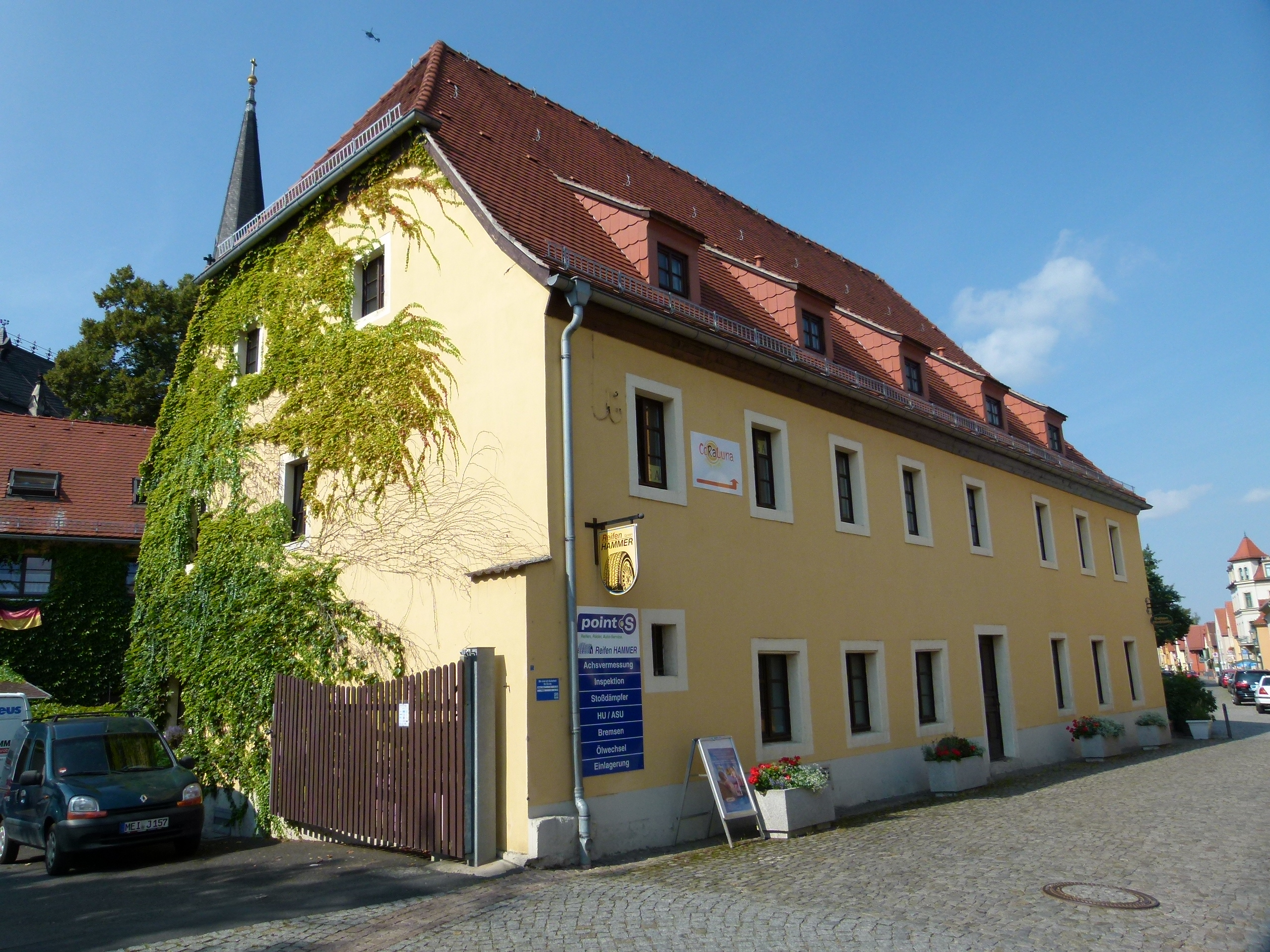 Denkmalgeschütztes Haus, Altkötzschenbroda 39, Radebeul, Sachsen